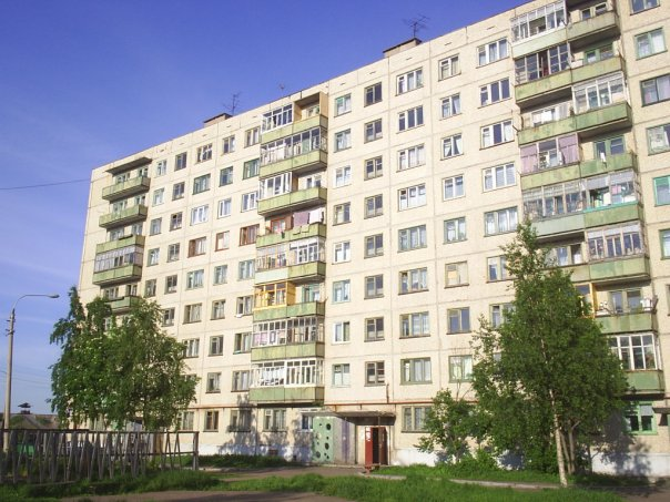 Жилой Дом № 6 по ул. 40-летия Великой Победы